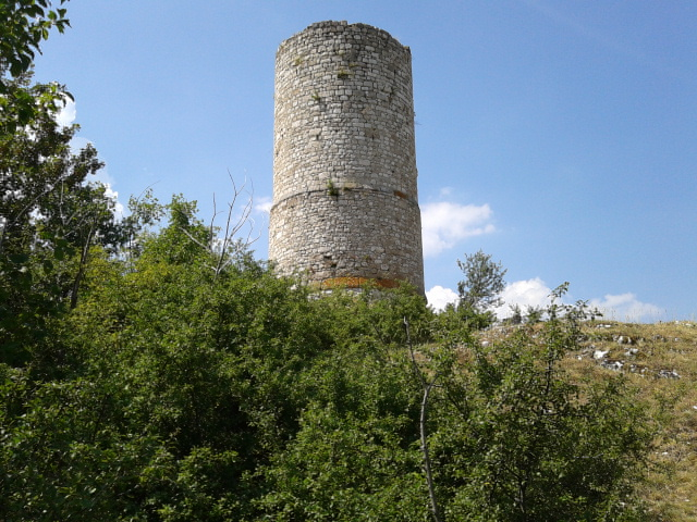 Torre di Sperone